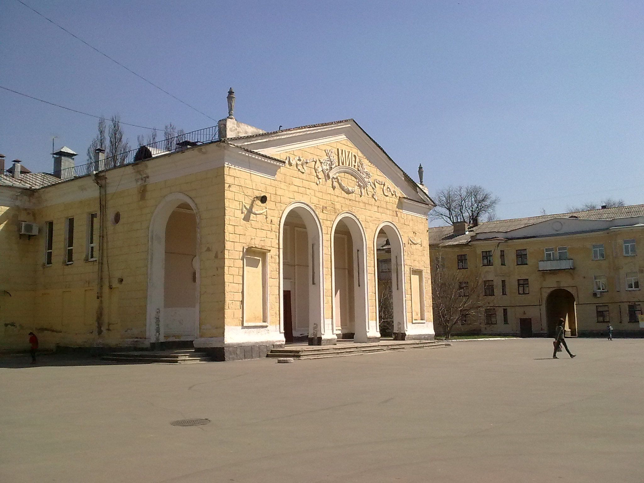 Gebäude gegenüber dem Lenin Denkmal in der Altstadt von Schowti Wody